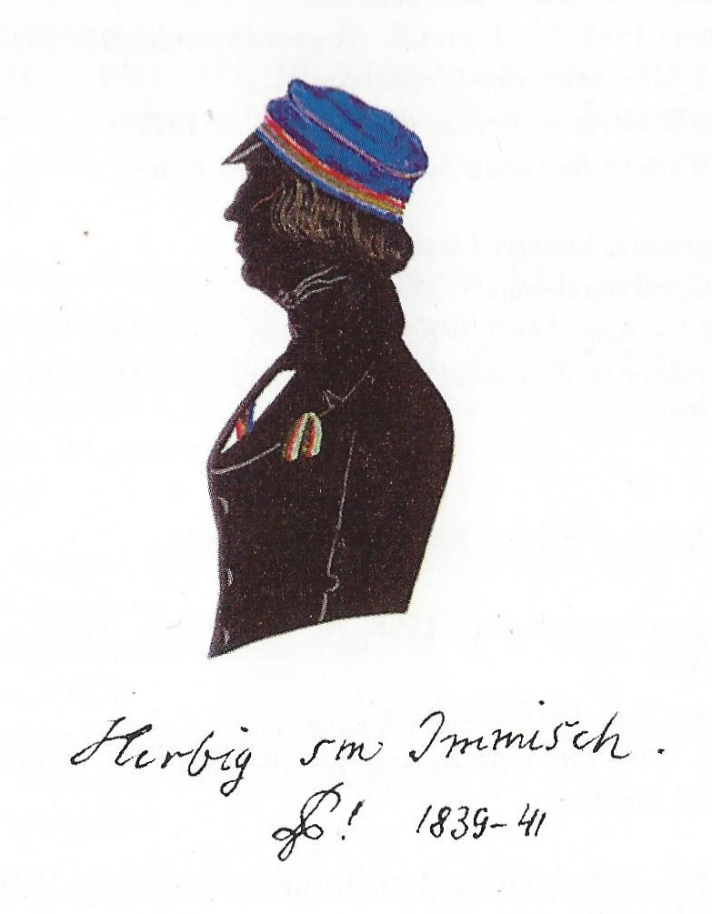 Silhouette von Scipio Agricola Herbig (1824-1891)